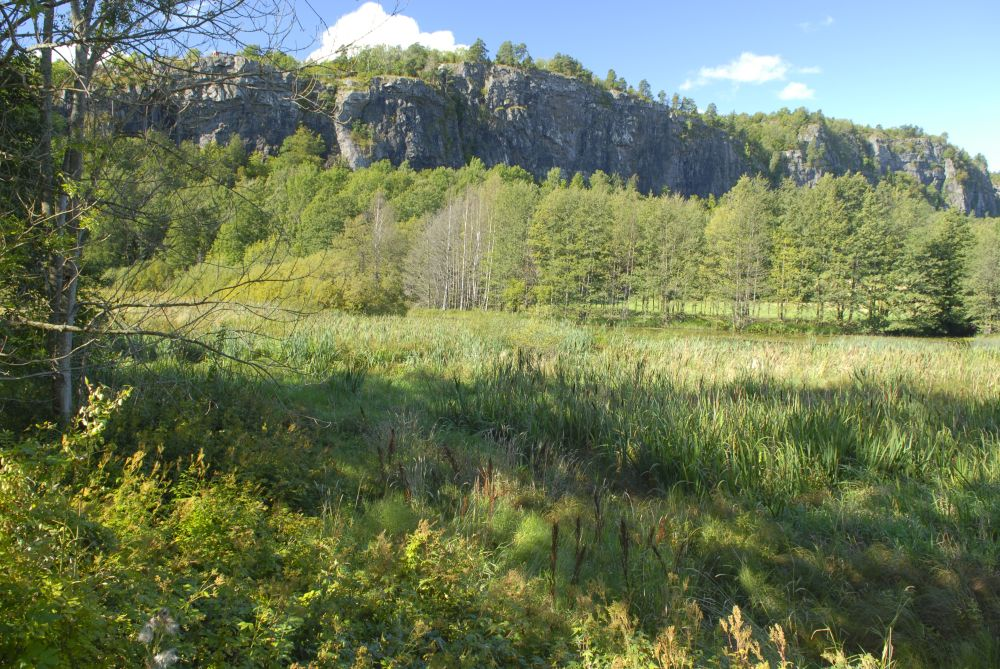 Falkenstendammen med Veggefjell i Falkensten naturreservat i bakgrunnen.